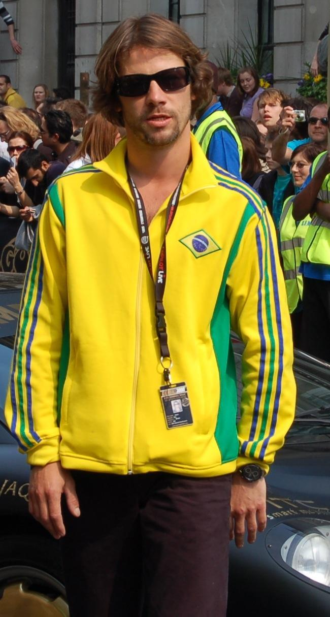 Jason Kay